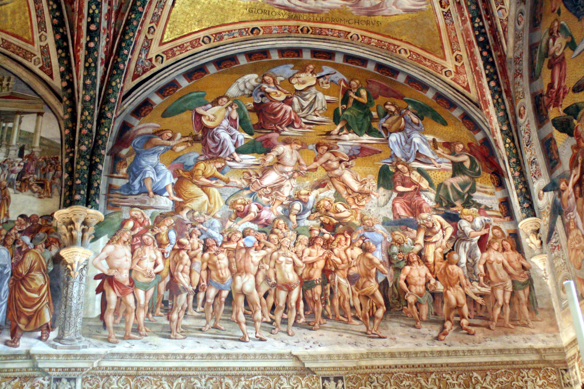 Die Auserwählten, Dom zu Orvieto